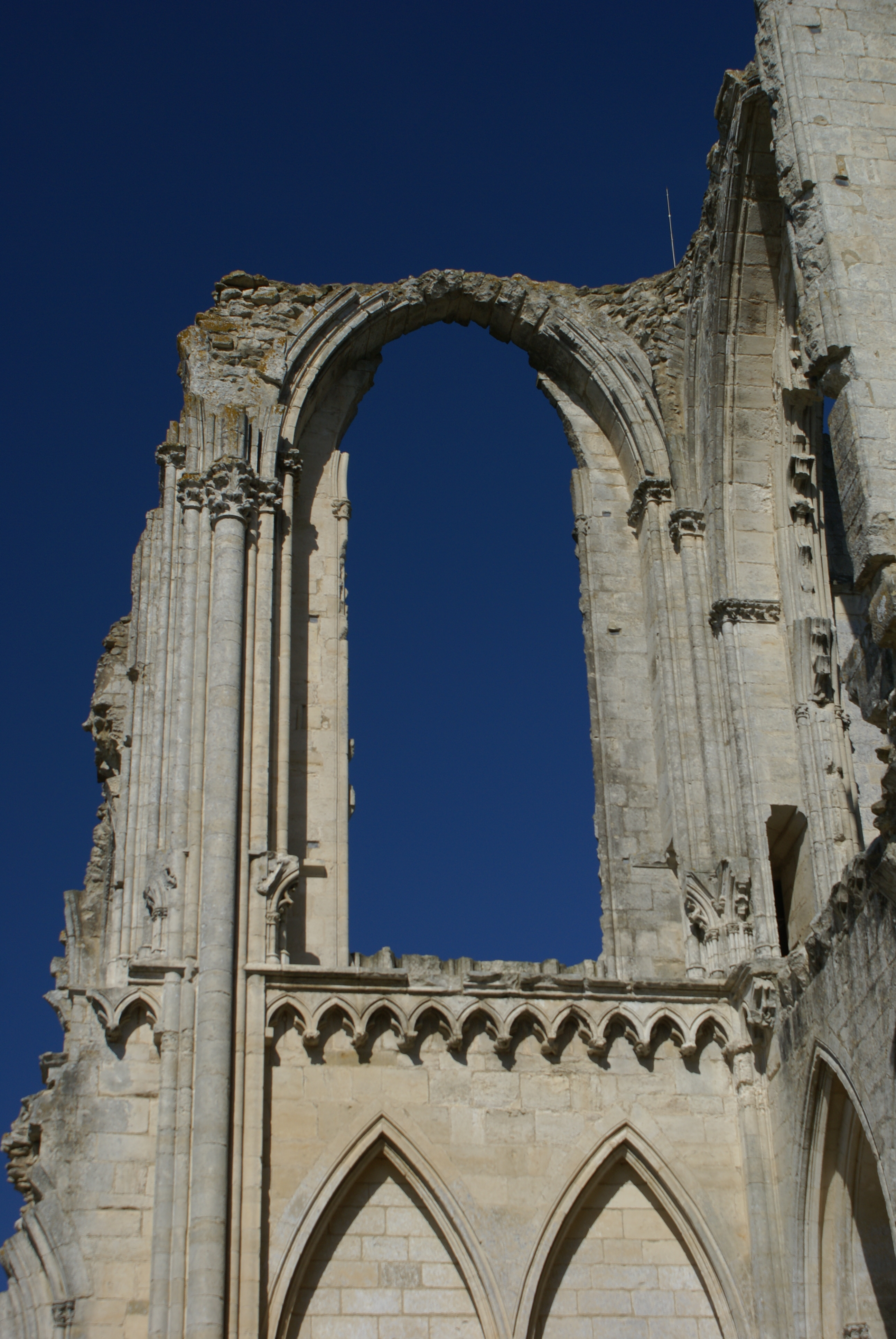 Ruines de l'abbaye de Maillezais - Vieille abbaye Saint-Pierre